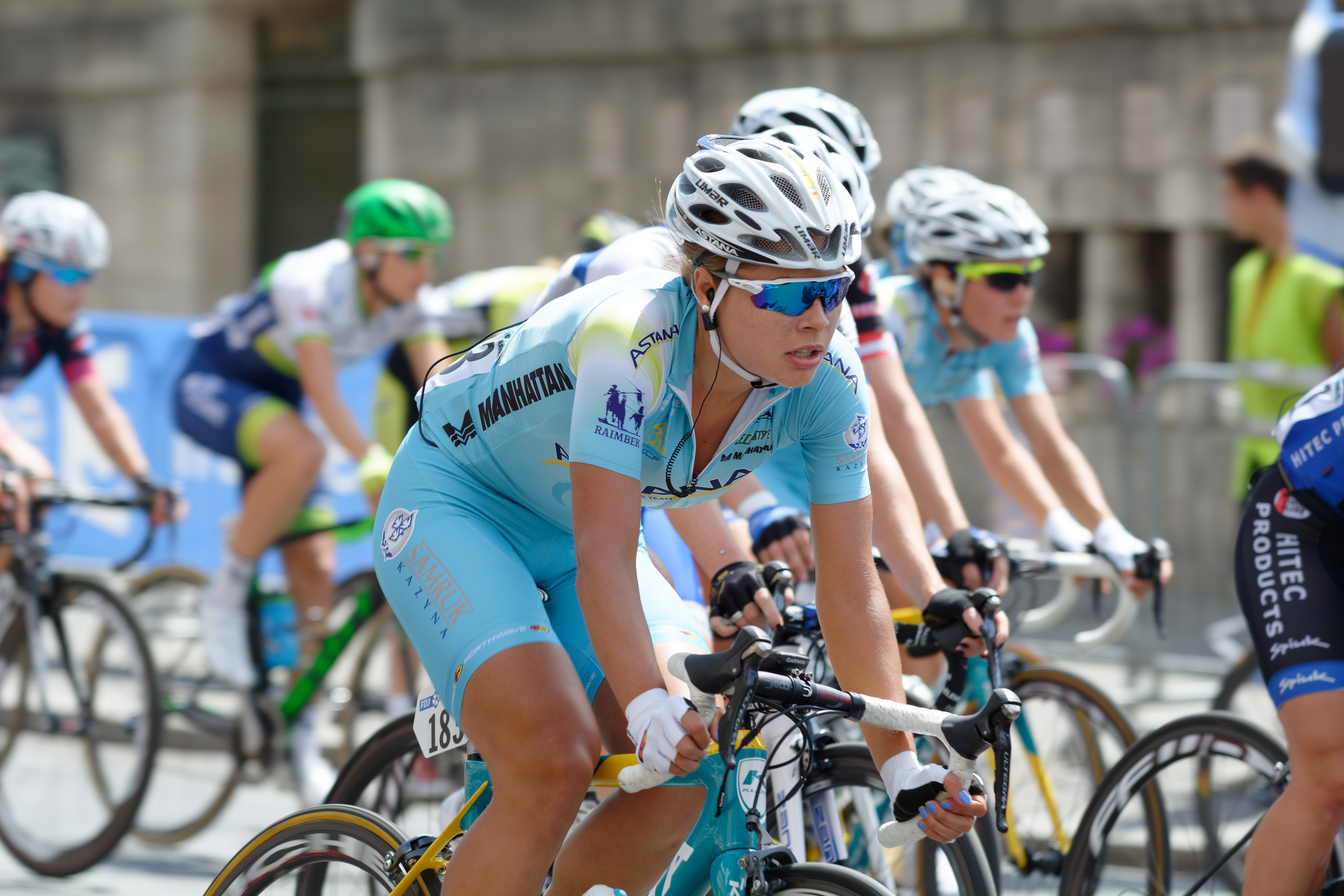 D71_9211_DxO